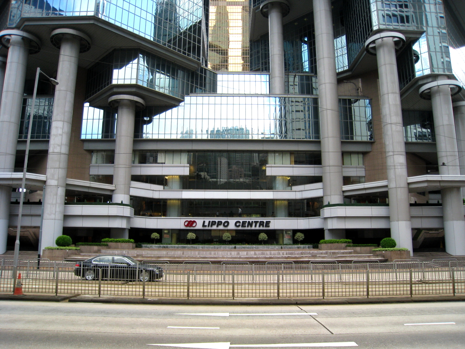 HK Lippo Centre 力寶中心